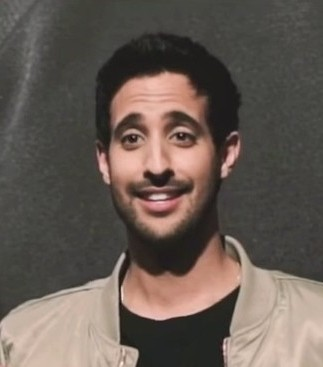 Gemeinsam mit REVIEW hat YouTuber Sami Slimani seine erste Modekollektion entworfen! Die Launch Party fand im Boui Boui Bilk in Düsseldorf statt, unter den Gästen waren neben Sami Slimani auch Steffi Giesinger, Caro Daur, Farina Opoku, Jüli Mery, Shanti Tan, Anna Maria und Katharina Damm, Ischtar Isik, Philipp Jakob, Patrizia Palme, Lamiya Slimani, Maren Merkel, Tobias Wolf, Emrah Tekin, Pamela Reif, Max Giesinger, Madeline Juno, Chris Brenner, André Hamann und, und, und! Schön war es mit euch! REVIEWbySamiSlimami